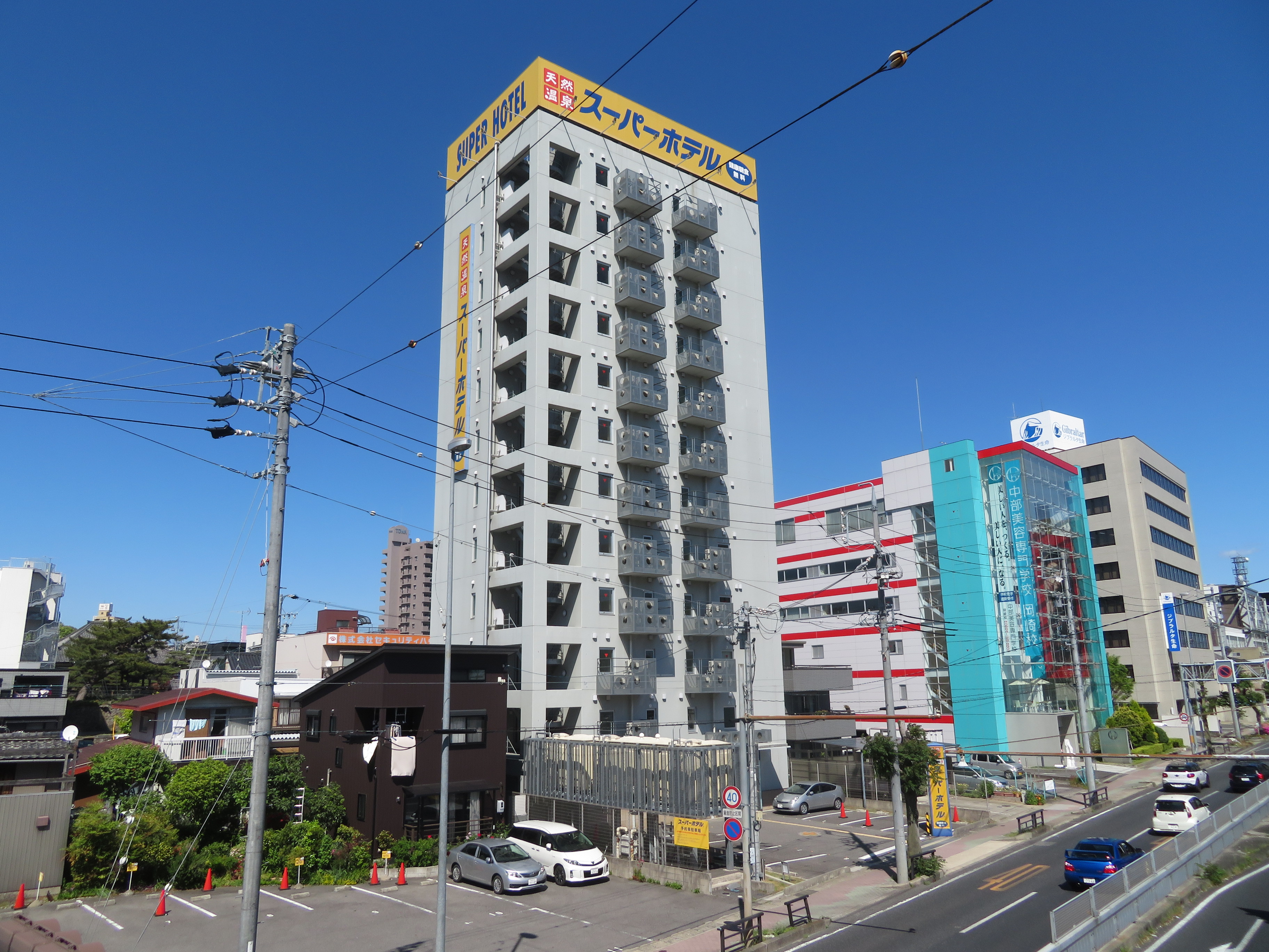 スーパーホテル岡崎（岡崎市祐金町）